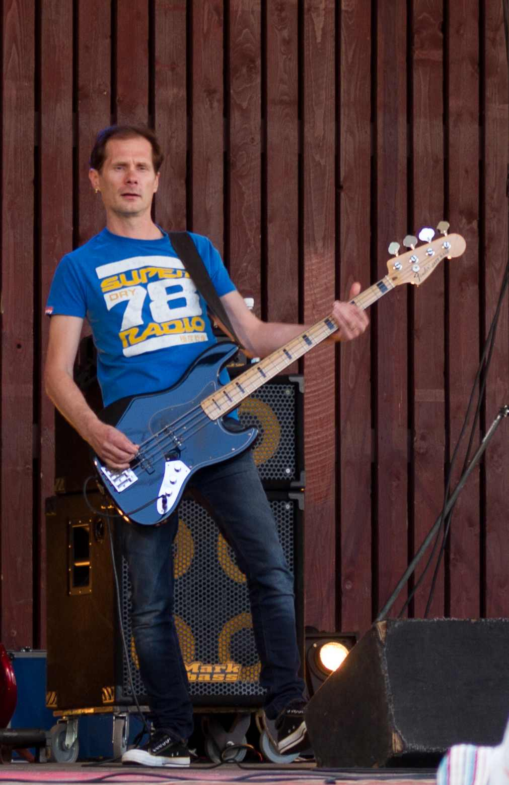 Harri Ruotjoki suomalainen basisti